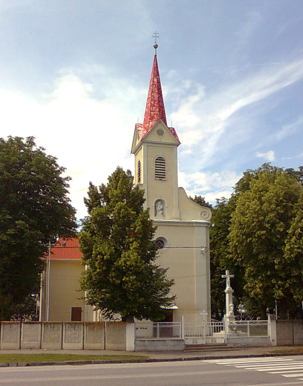 Večianský kostol